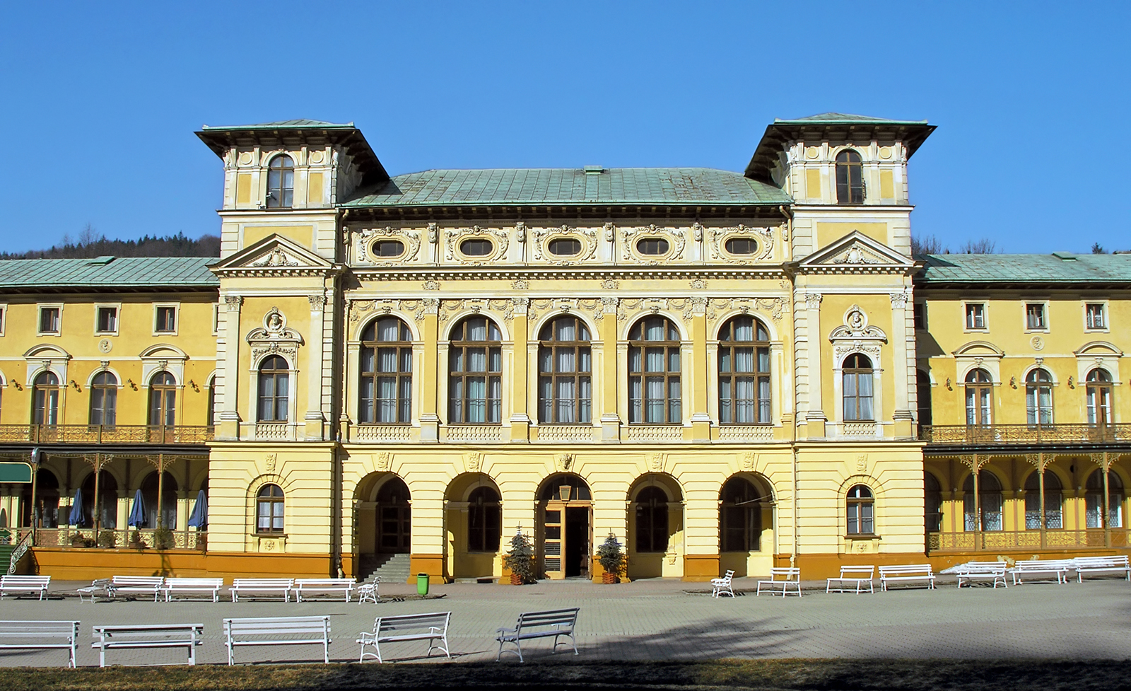 „Dworzec Zdrojowy” (Stary Dom Zdrojowy) Krynica-Zdrój, Krynica-Zdrój